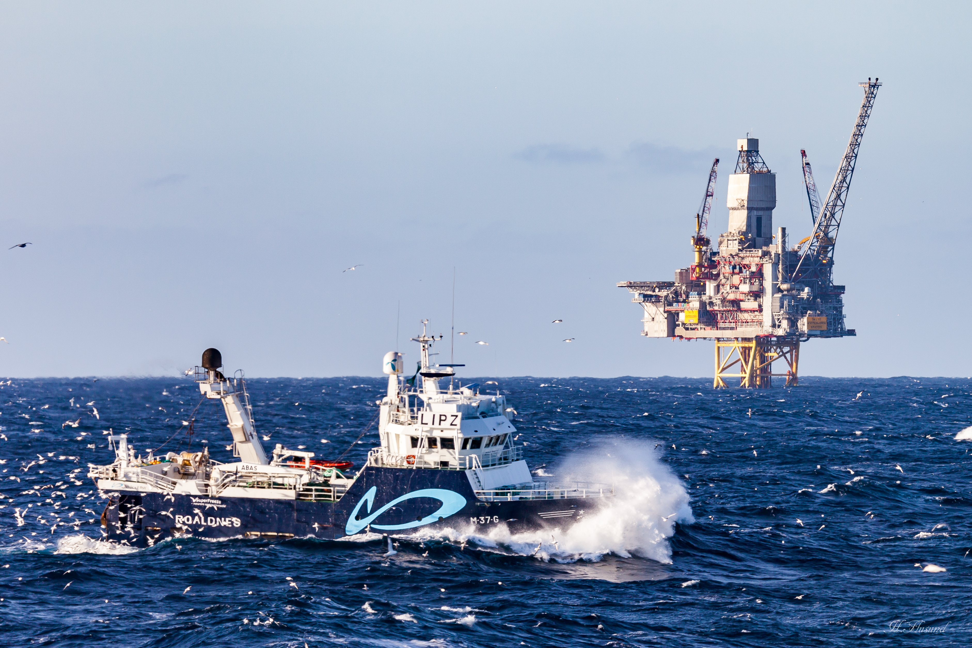 Seitråleren "Roaldnes" ved Kvitebjørn.